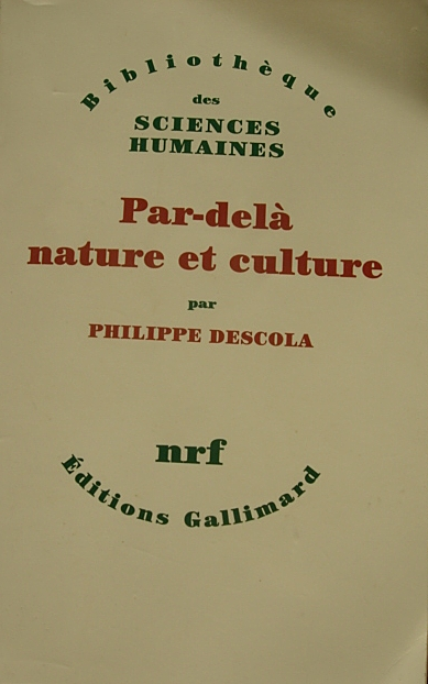 Frontispice du livre : Philippe Descola, Par-delà nature et culture